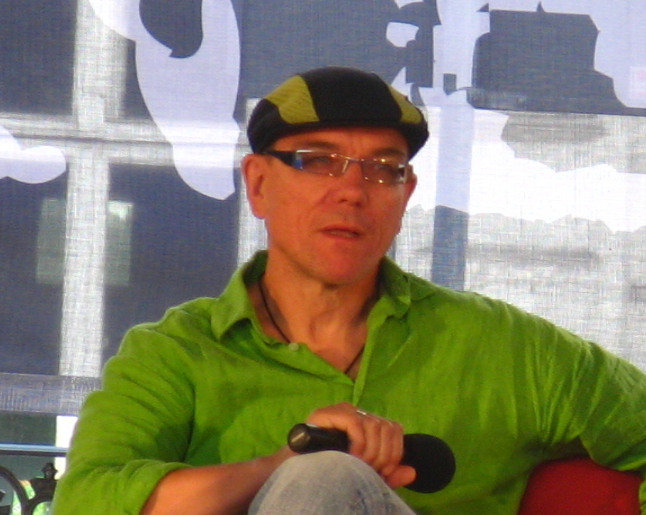 Mirosław Zbrojewicz - polski aktor II Międzynarodowy Festiwal Zawodów Filmowych CINEMAGIC w Płocku (22-24 czerwca 2007 r.)